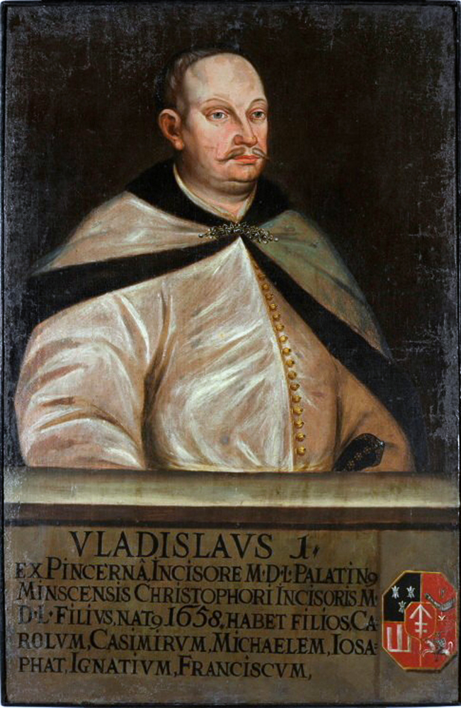 Беларуская (тарашкевіца): Партрэт Уладзіслава Язафата Сапегі (Uładzisłaŭ Jazafat Sapieha) гербу «Ліс» (1652—1733), дзяржаўнага і вайсковага дзеяча Вялікага Княства Літоўскага, чашніка і крайчага вялікага літоўскага, ваяводы менскага і берасьцейскага